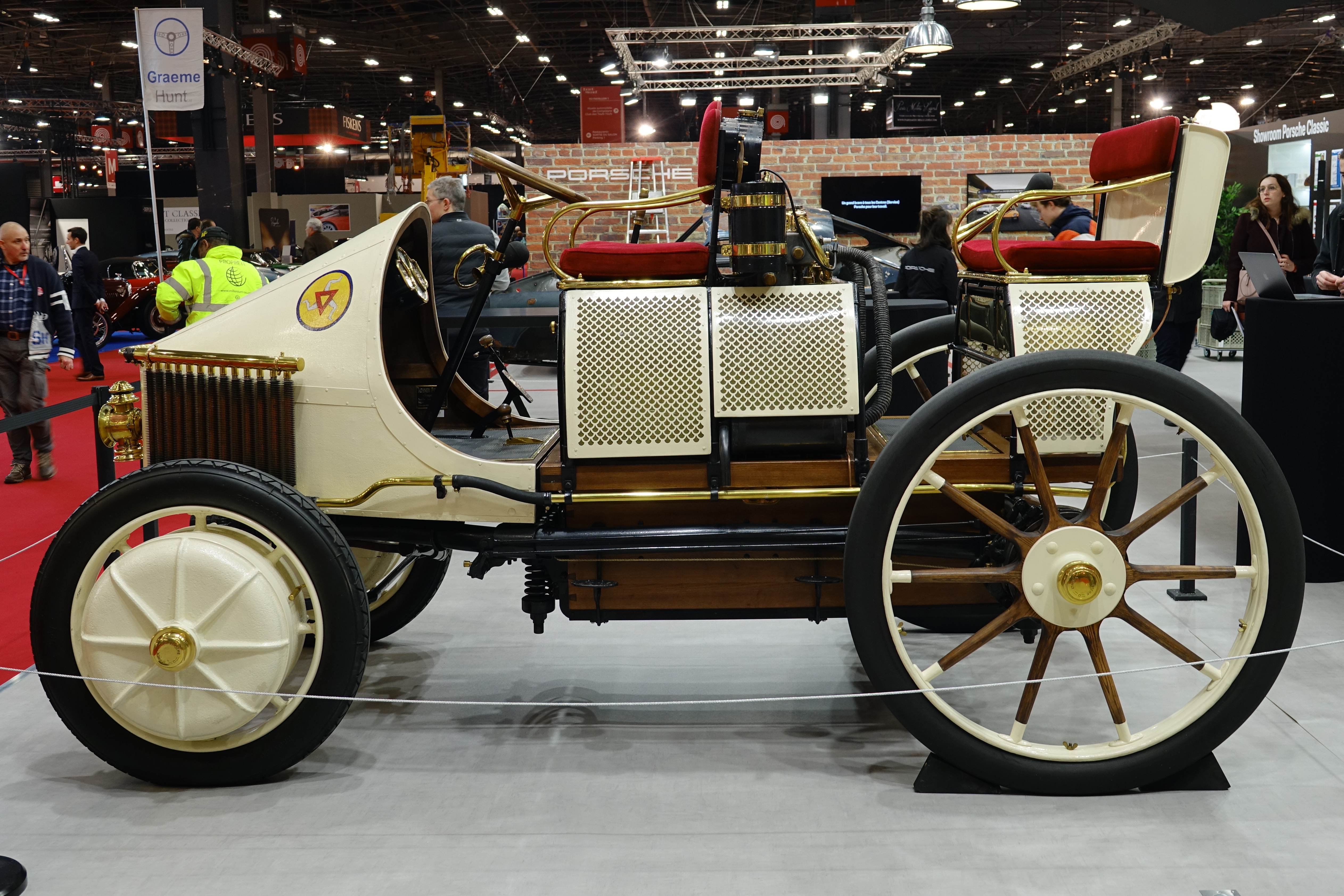 Semper Vivus - Porsche - Rétromobile 2020